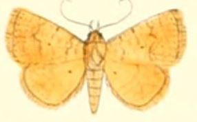 Raparna ochreipennis Moore, 1882